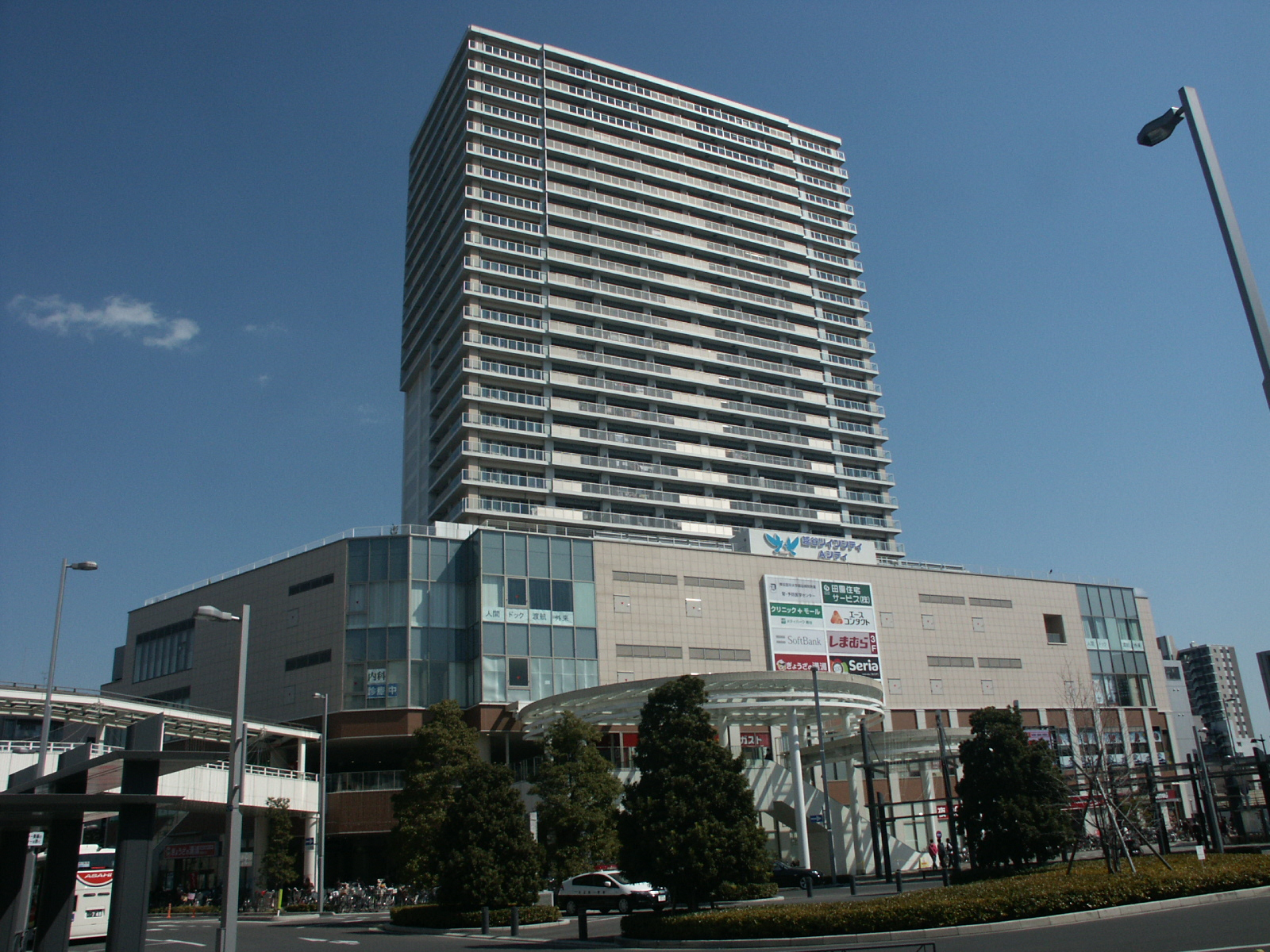 越谷ツインシティ（Ａシティ越谷駅前ロータリー側から撮影）